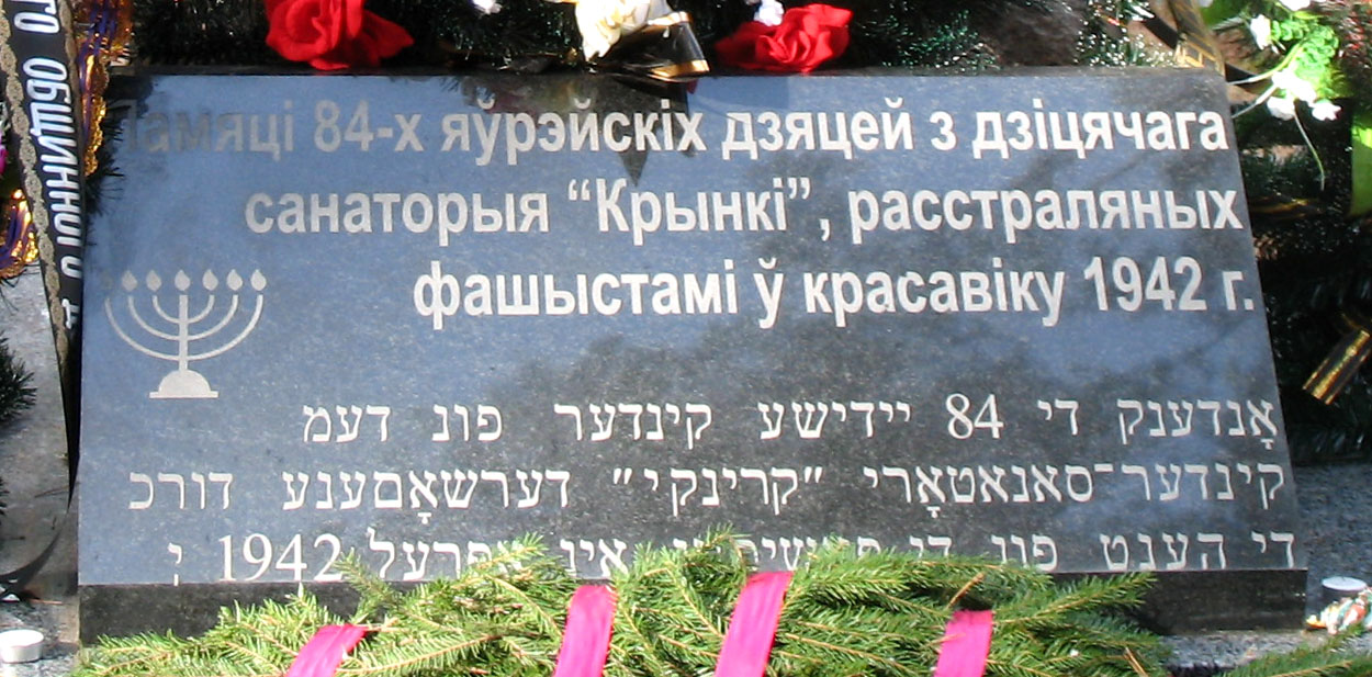 Надпись на памятнике на месте убийства в апреле 1942 года нацистами и полицаями 84 еврейских детей из гетто, созданного в санатории Крынки Осиповичского района.